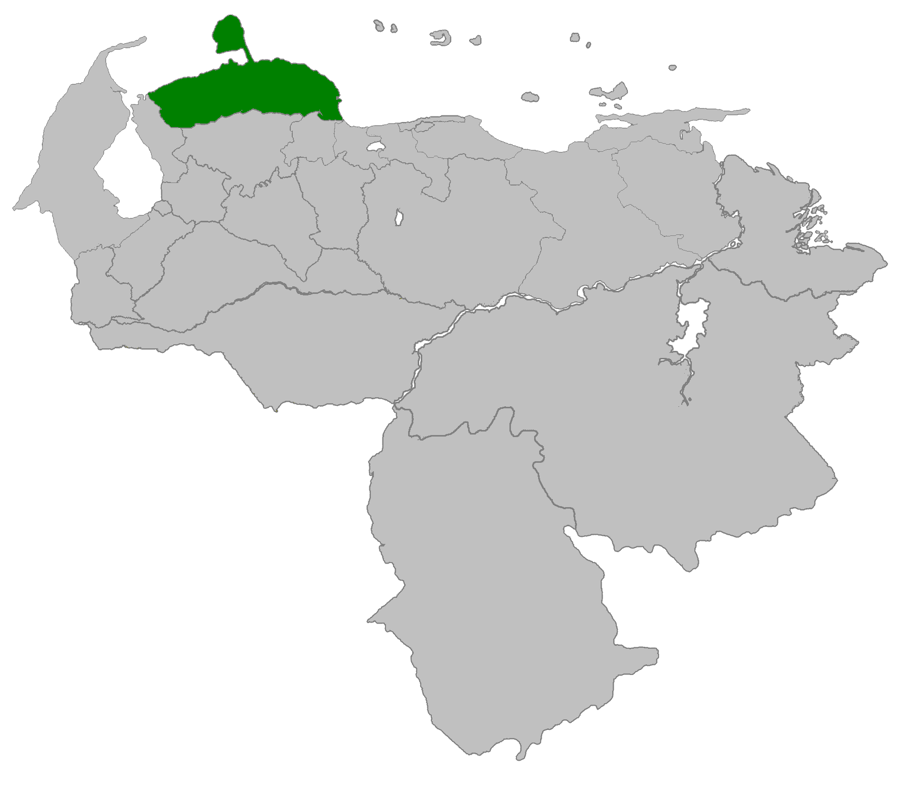 Ubicación del estado Falcón Venezuela